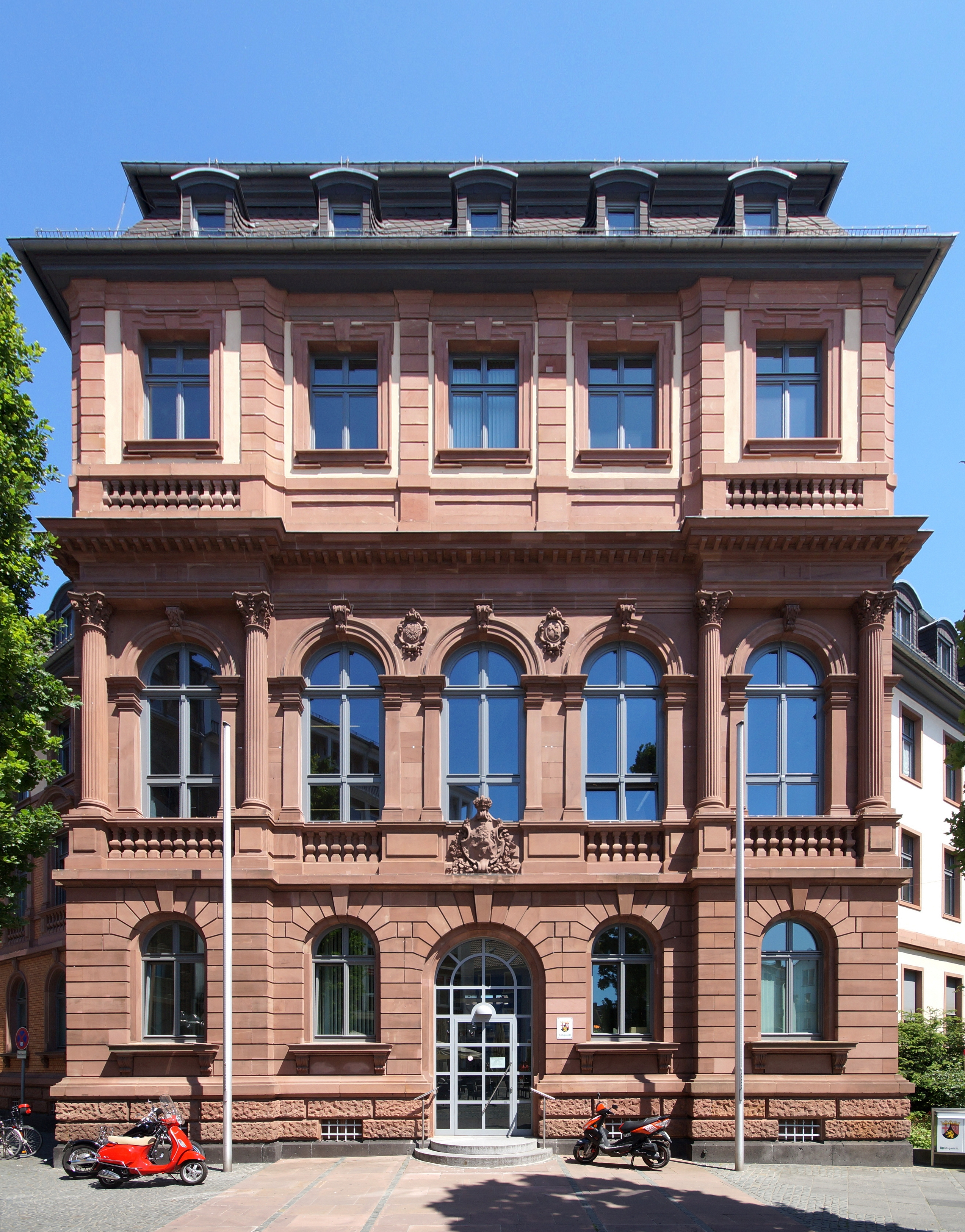 Das Gebäude des Amtsgerichts Worms in der Hardtgasse 6 am Obermarkt in Worms